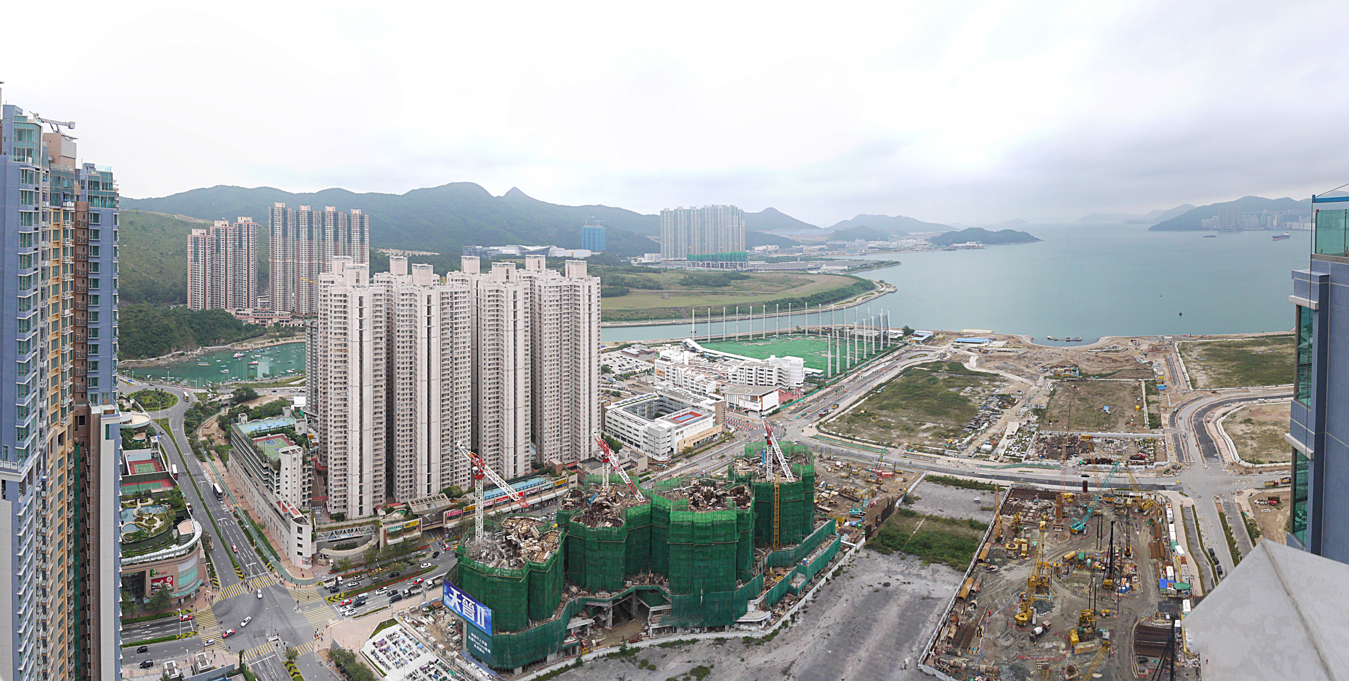 中文（香港）: 寶盈鳥瞰圖。